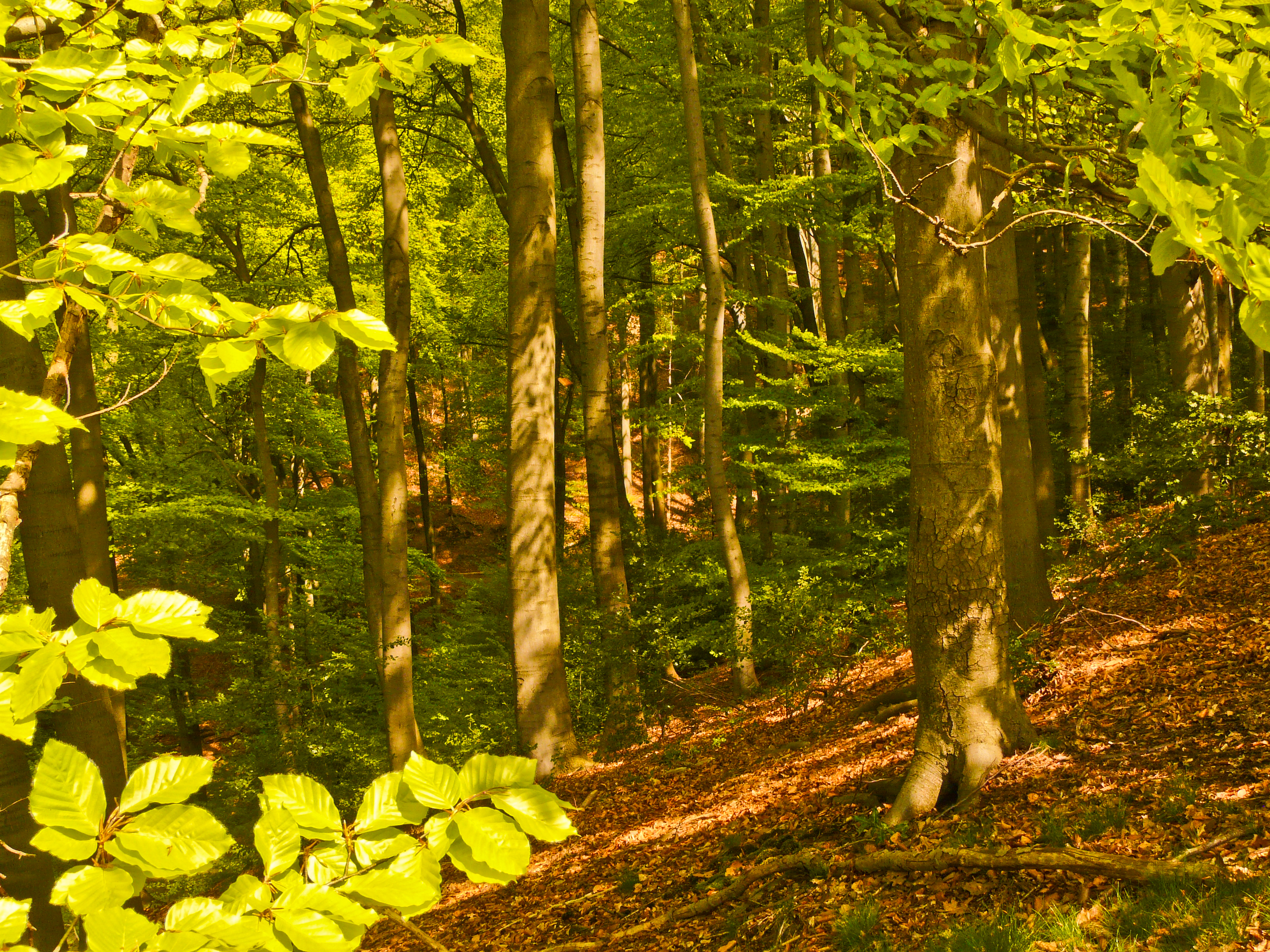 Rotbuchenwald im Mai in der Naturwaldzelle Meersiepenkopf im Staatsforst Burgholz